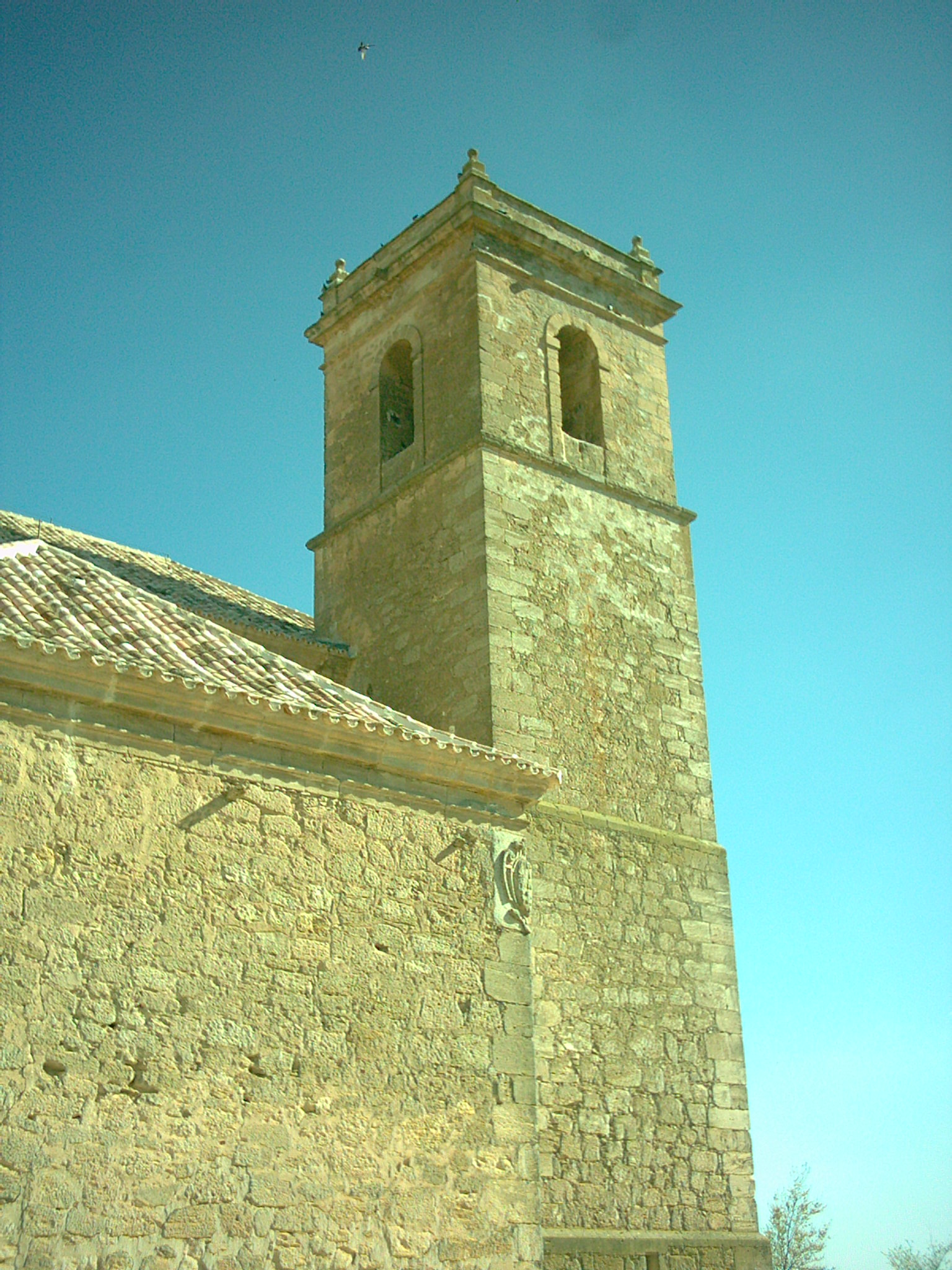 Vista trasera de la iglesia de Santiago Apóstol en Santa Cruz de la Zarza (Toledo, Spain) // Church of St. James Apostle in Santa Cruz de la Zarza (Spain)